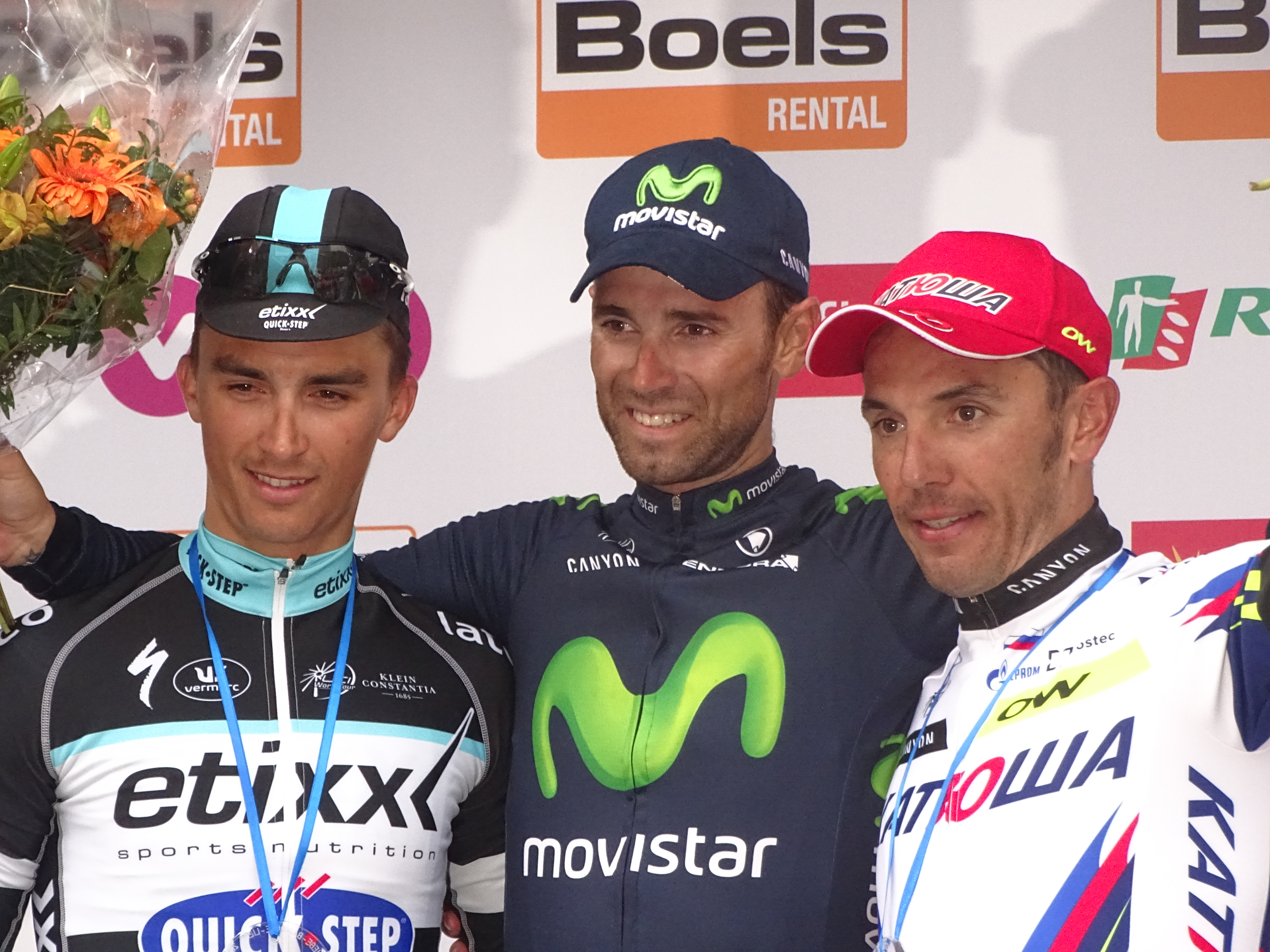 Reportage réalisé le dimanche 26 avril à l'occasion de l'arrivée de Liège-Bastogne-Liège 2015 à Ans, Belgique.